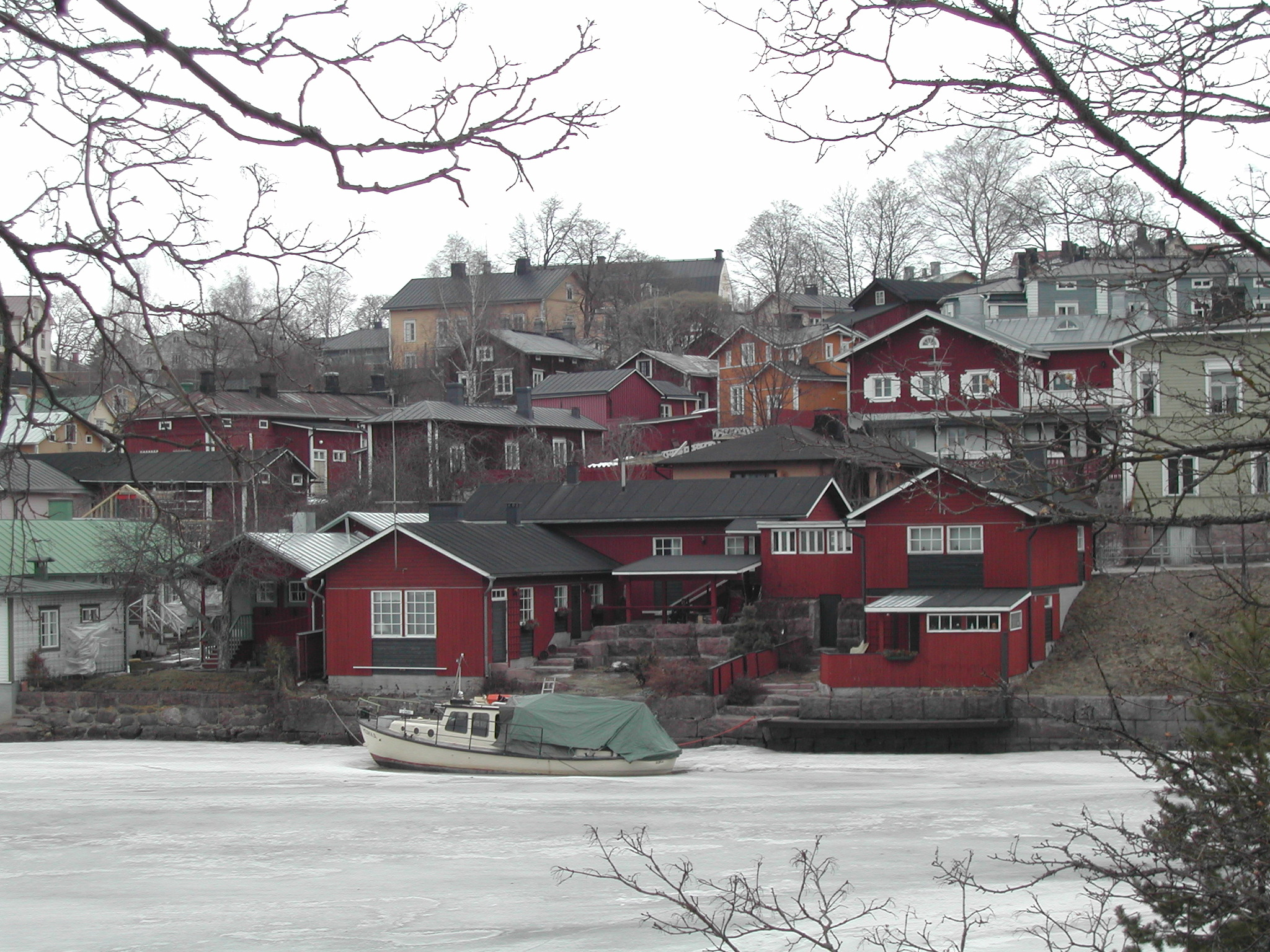 Porvoo (Finlande).